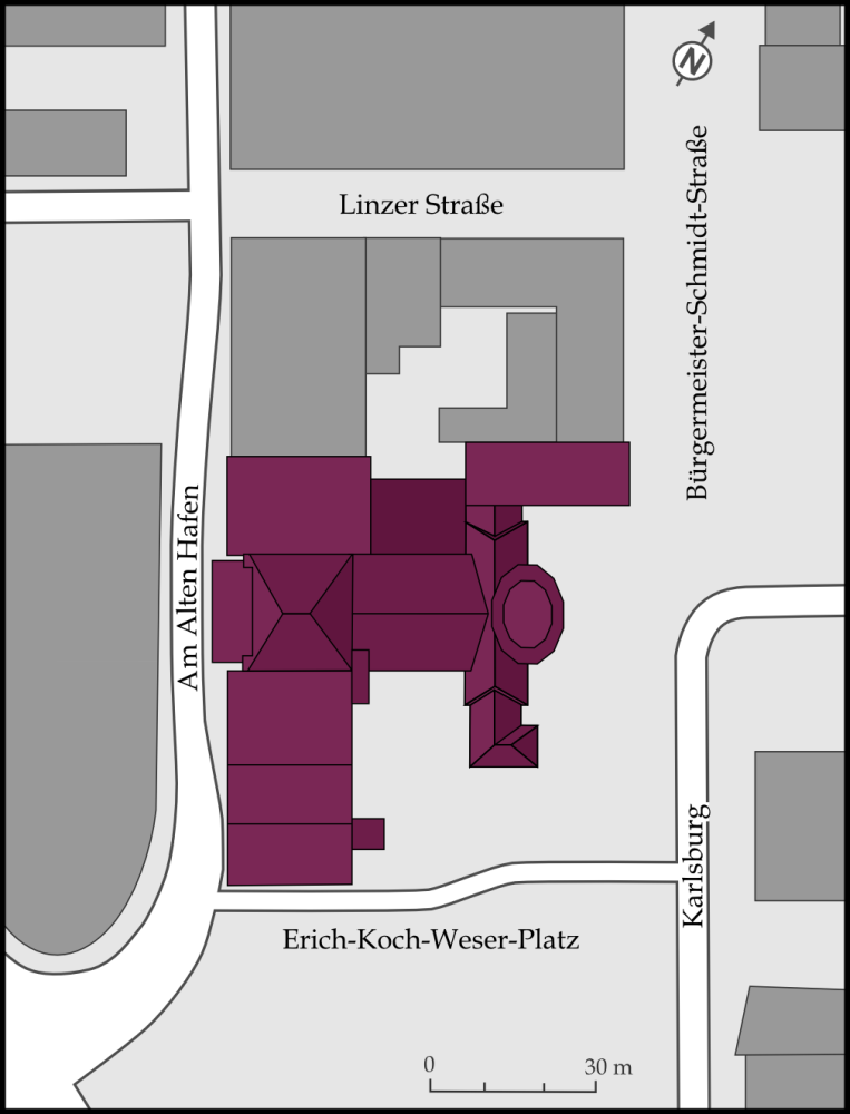 Grundrisskarte Stadttheater Bremerhaven